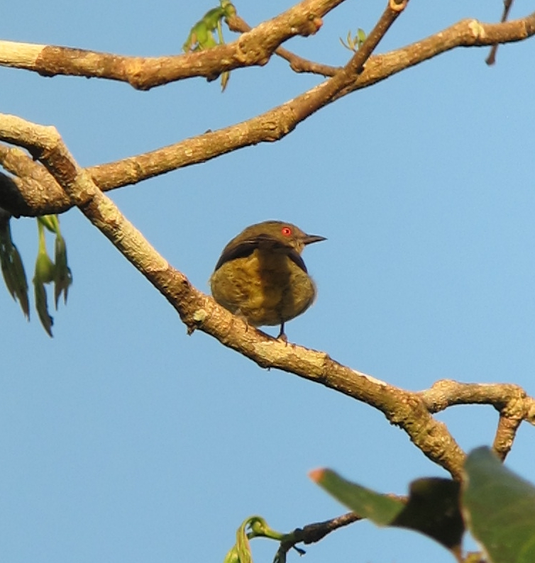 Puerto Nariño, Amazonas, Colombia